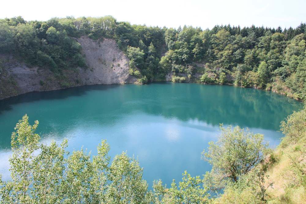 Willscheider Bergsee, Vettelschoß